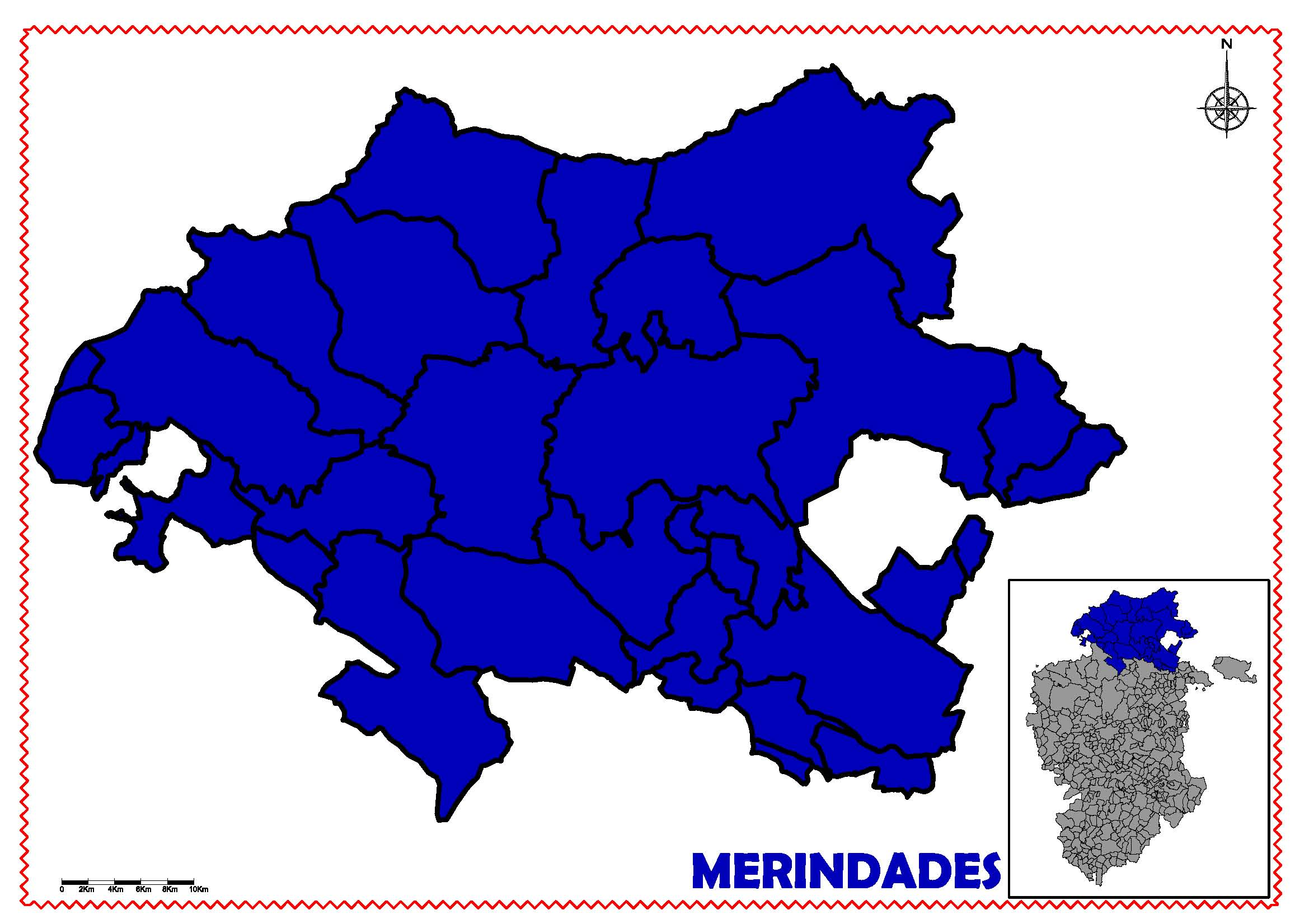 Ubicación de la comarca de Merindades en la provincia de Burgos